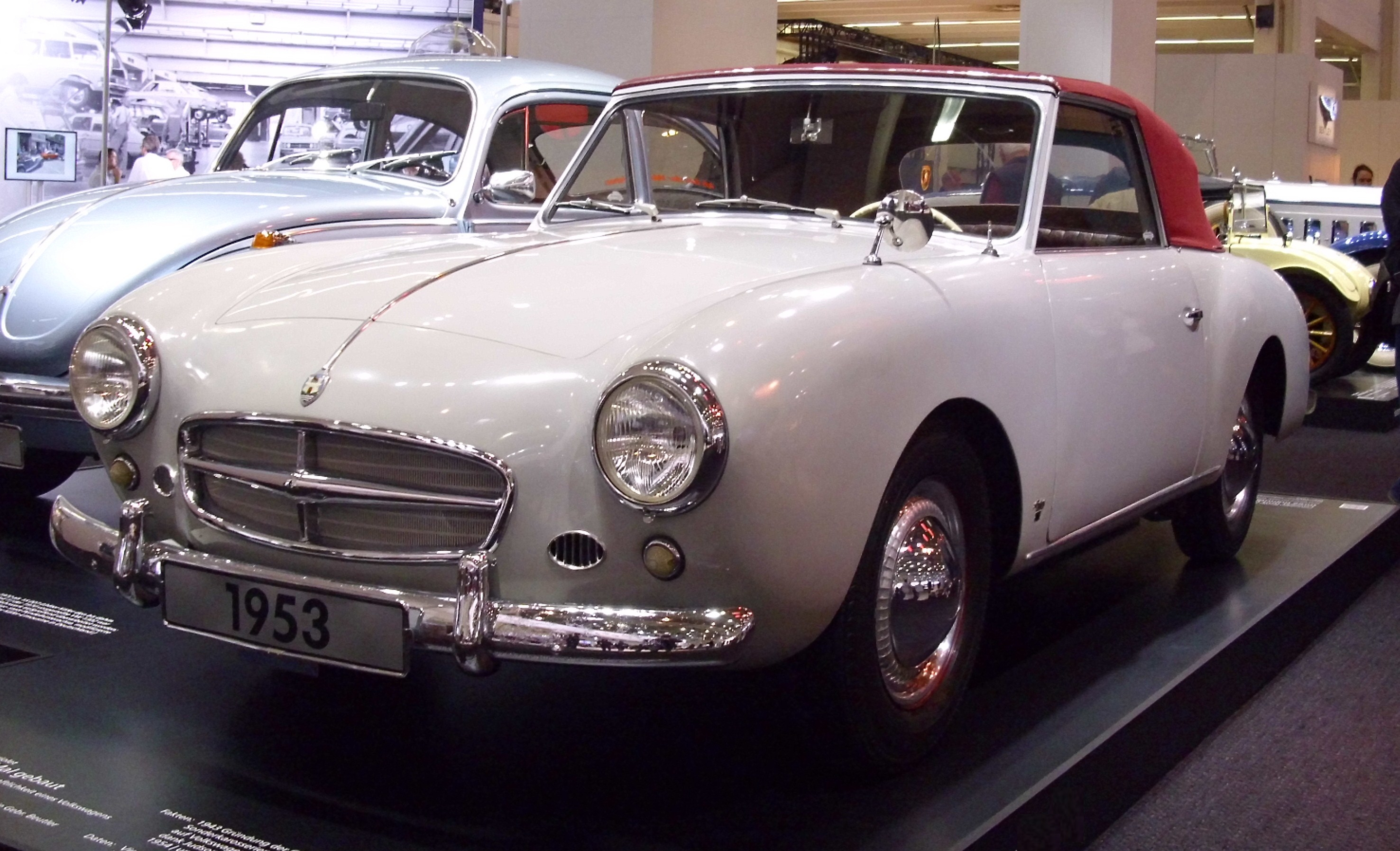 VW Cabriolet von Beutler 1953